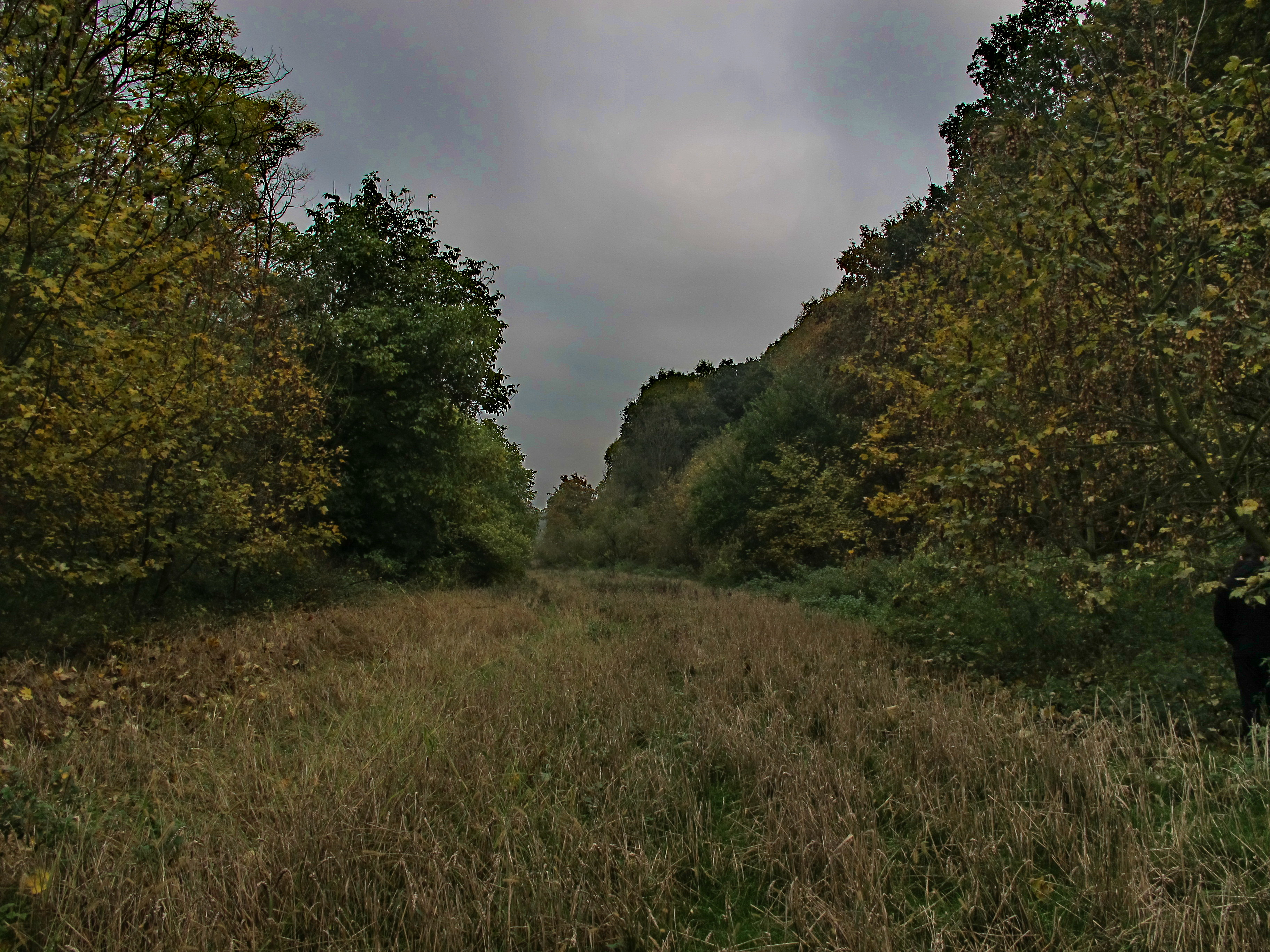 Louka nad potokem